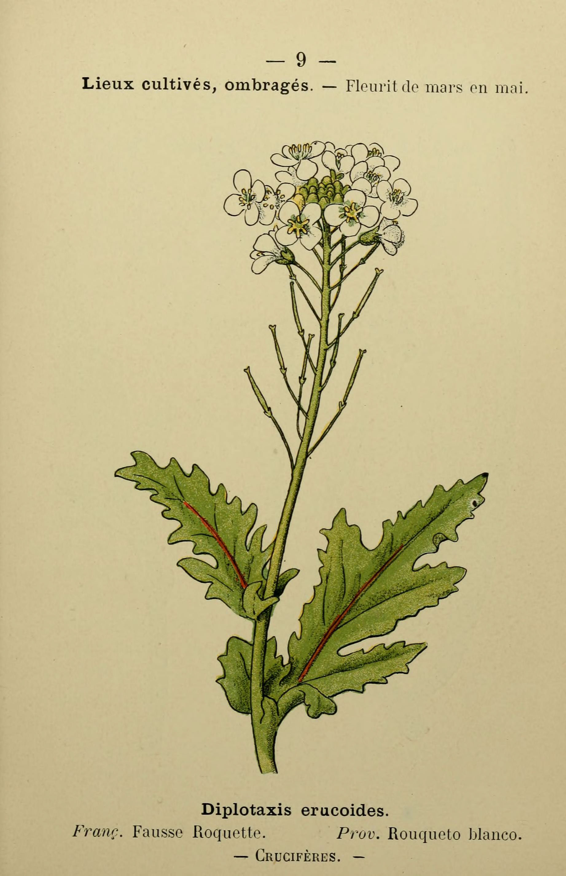 — 9 - Lieux cultivés, ombragés. — Fleurit de mars on mai. Diplotaxis eracoides. Franc. Fausse Roquette. Prov. Rouqueto blanco. — Crucifères. —